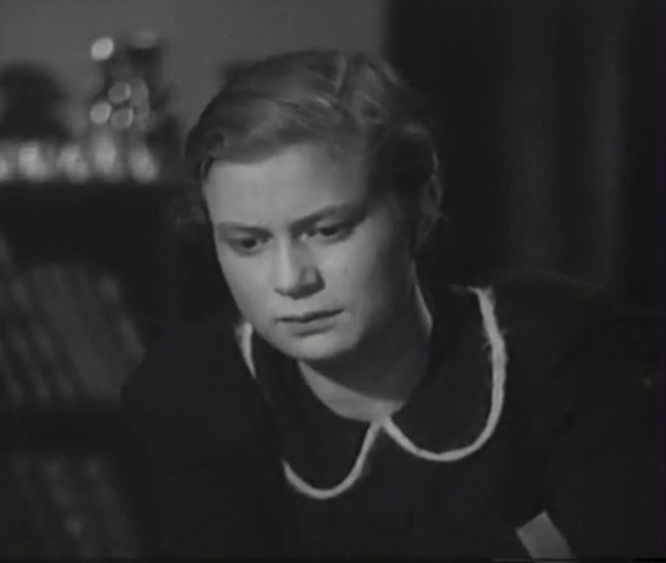 Tamara Alëšina nel film "Morskoj Batal'on"